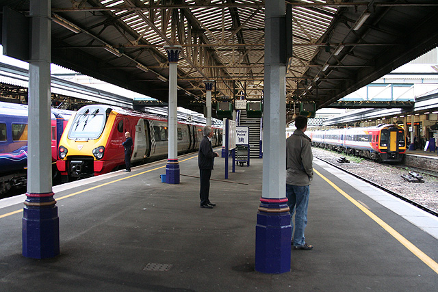 Exeter: on Exeter St David's station